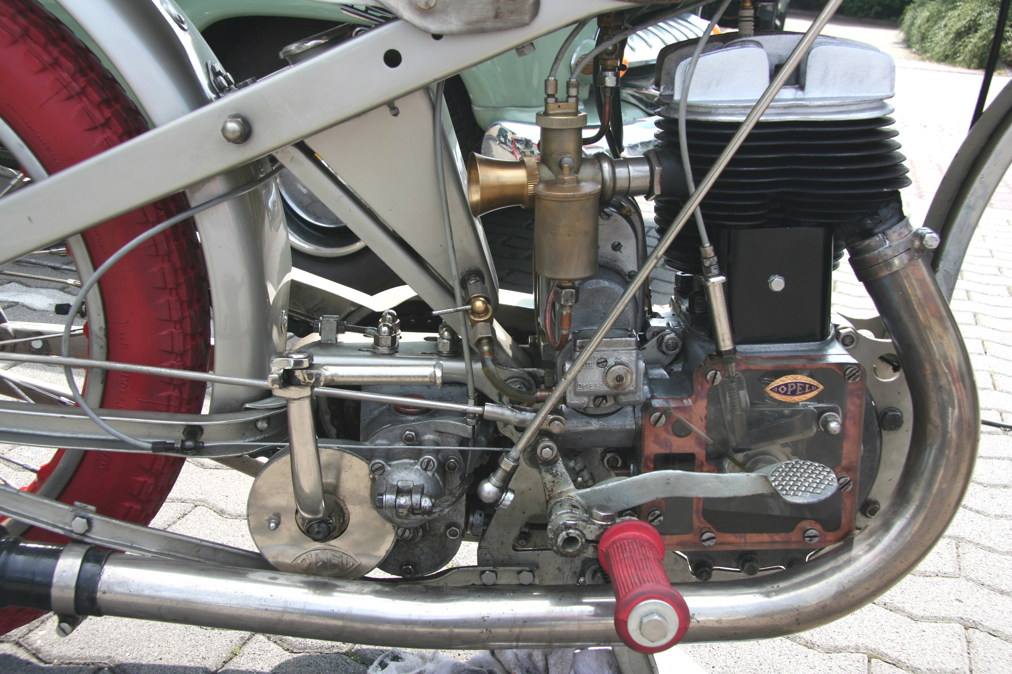 Opel Motoclub T, gebaut von 1928 bis 1930, Motor mit stehenden Ventilen, Leistung 16 PS. Das Modell T oder „Tour“ hat im Gegensatz zur stärkeren „Super Sport“ nur ein Auspuffrohr.